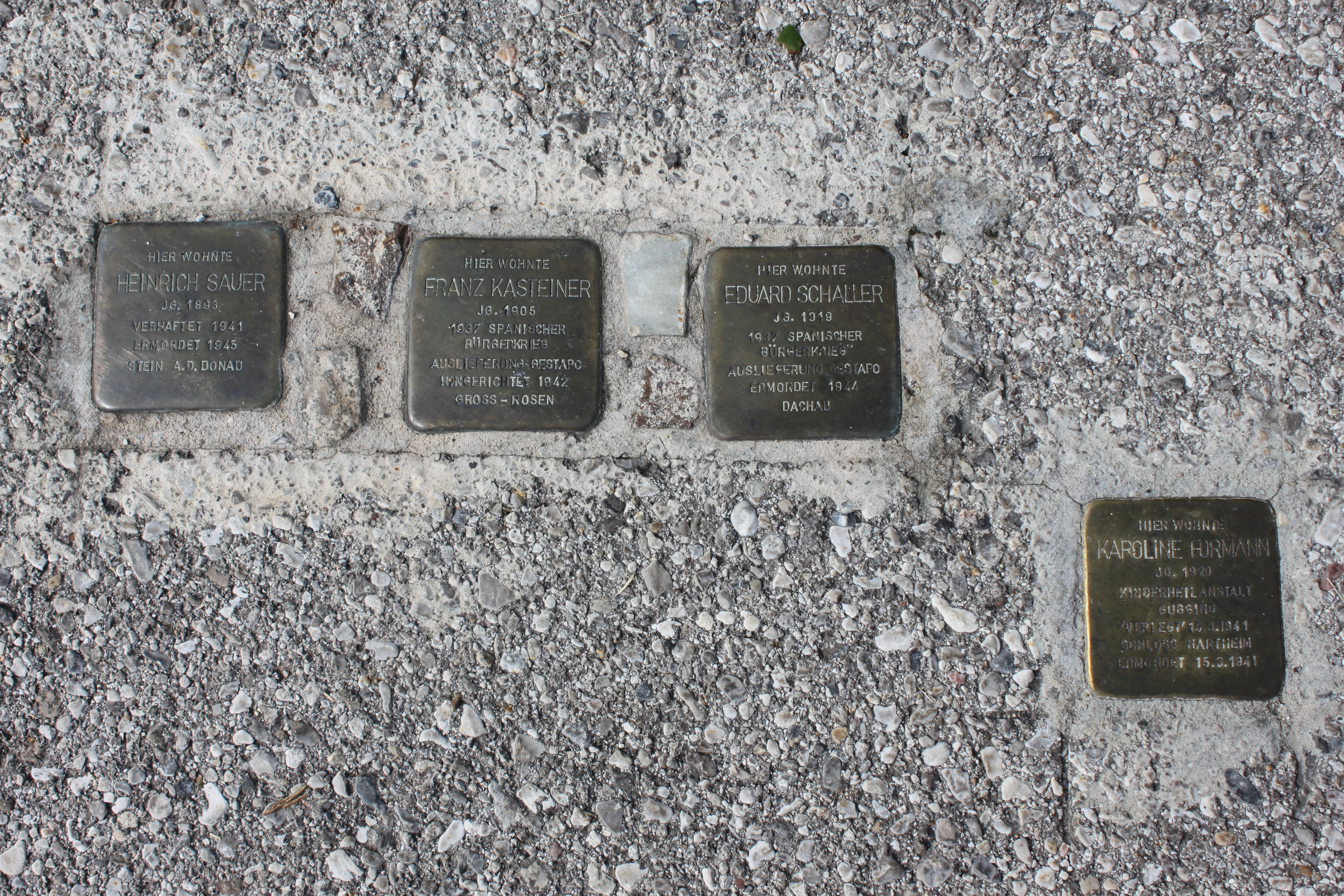 Vier Stolpersteine, im Gehsteig nähe ehemaliges Offiziers-Wohngebäude der Fliegerkaserne in Wiener Neustadt